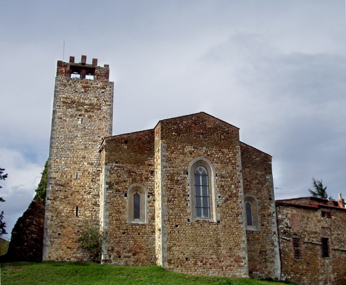 Abside della Pieve di San Giovanni Battista a Campagnatico